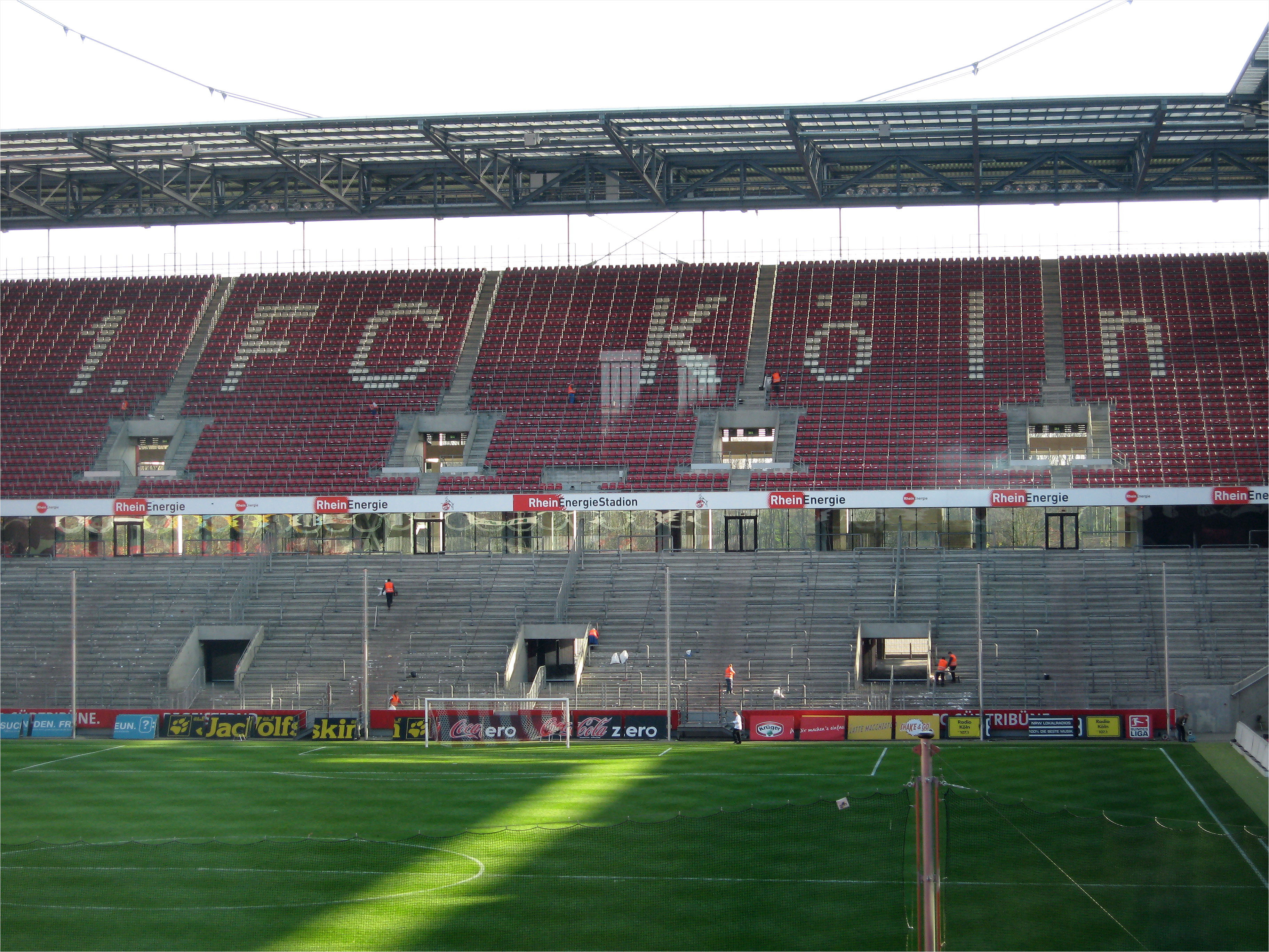 RheinEnergieStadion, 1. April 2007